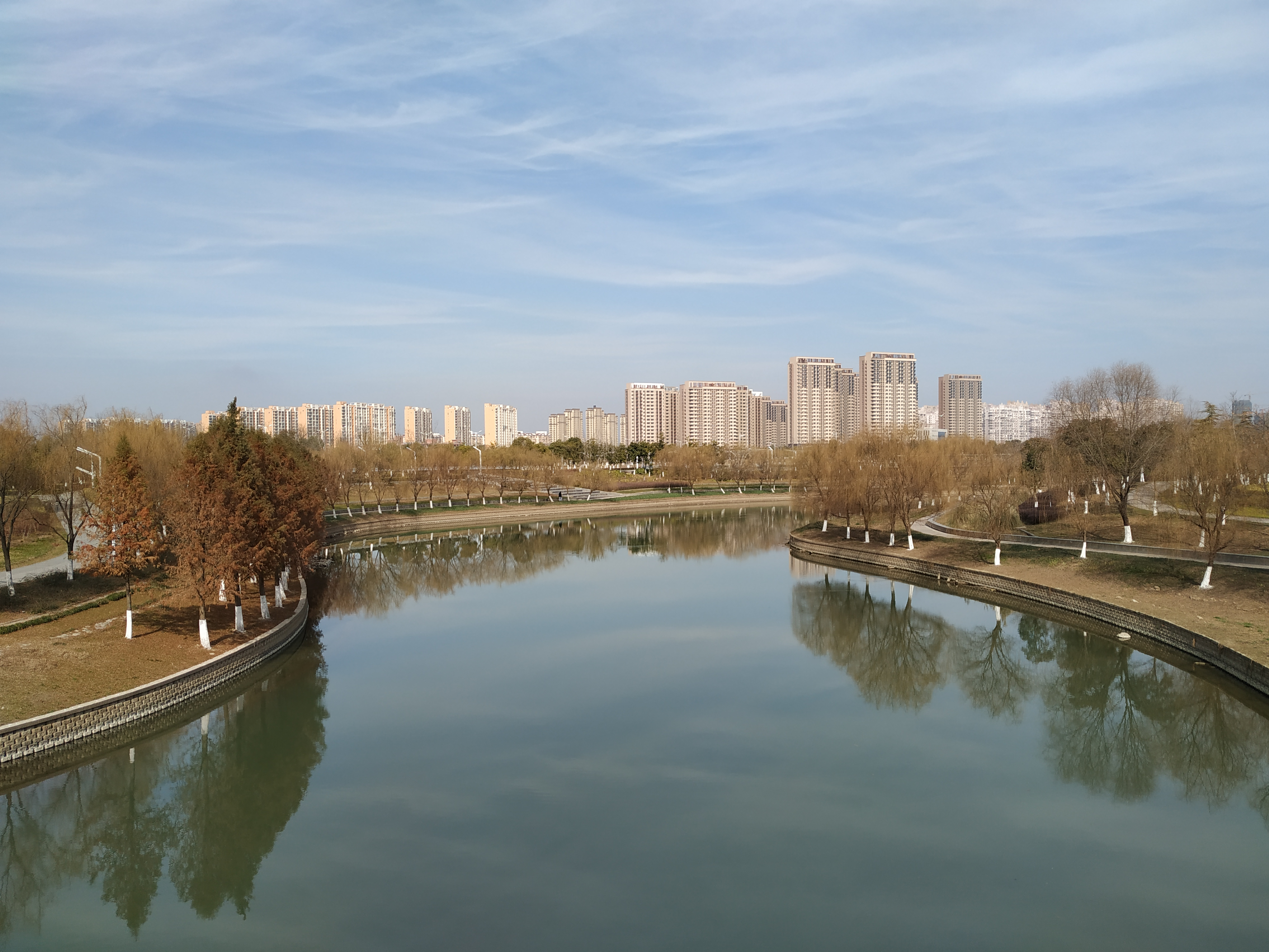 中文（中国大陆）: 南京市运粮河